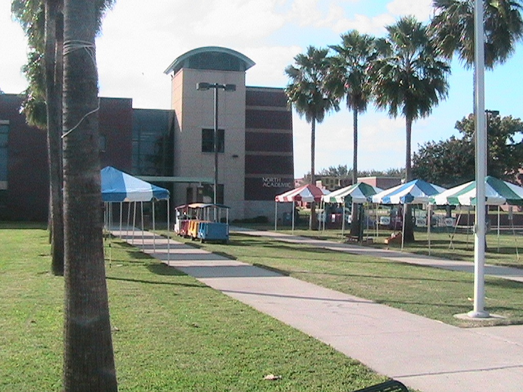 STC Fall Festival